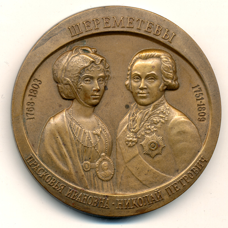 Le comte Nikolaï Petrovitch Cheremetiev (1751-1809) et son épouse, née Prascovia Ivanovna Kovaliova (1768-1803), fondateurs de l'hôpital en 1792.